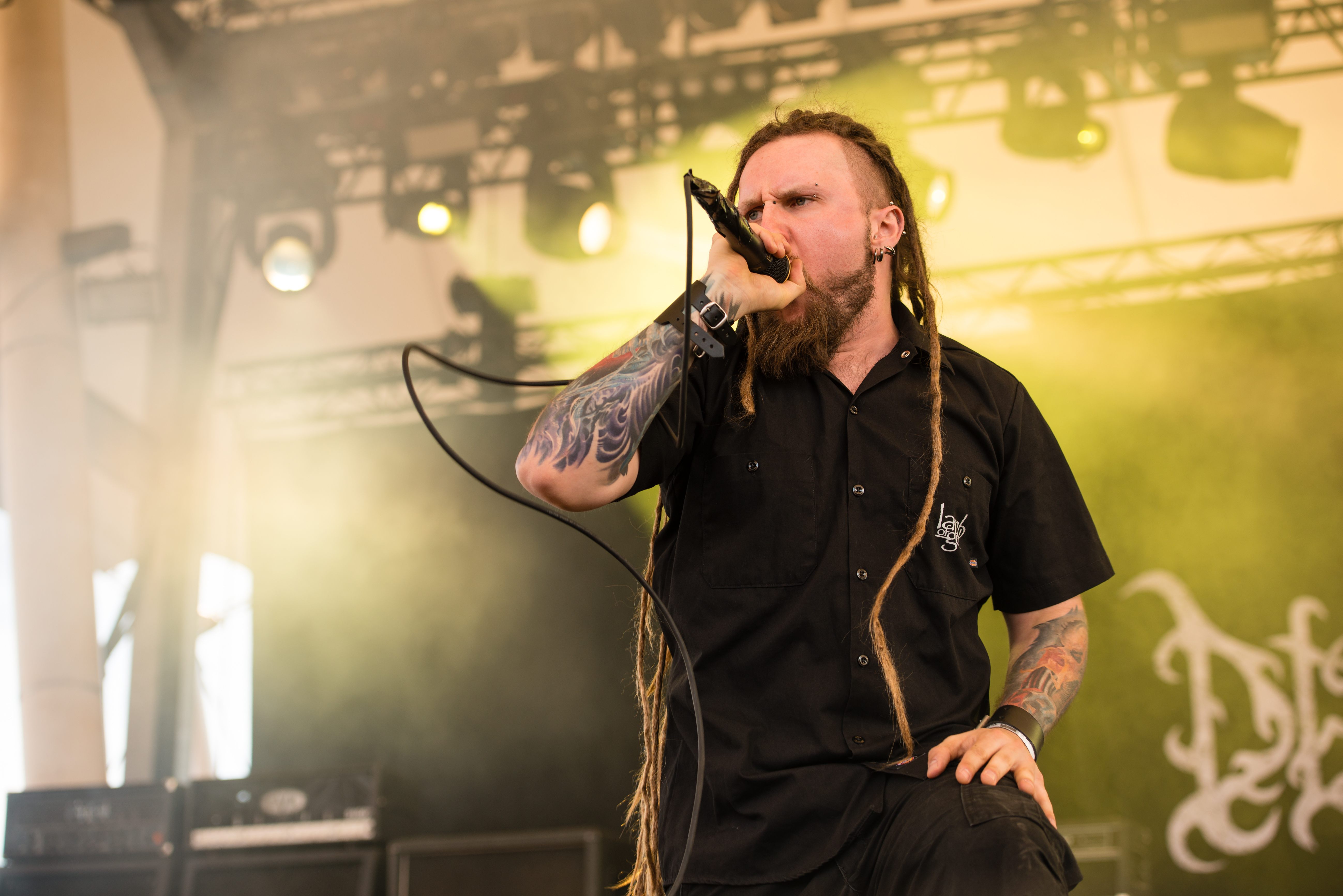 'Rock Hard Festival 2014 - Gelsenkirchen': 'Decapitated'